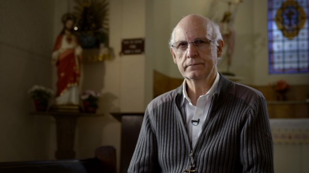 Júlio Renato Lancellotti (São Paulo, 27 de dezembro de 1948) é um sacerdote católico brasileiro, monsenhor e pároco da Igreja São Miguel Arcanjo no bairro da Mooca, na cidade de São Paulo. Além da paróquia, o monsenhor também é responsável pelas missas realizadas na capela da Universidade São Judas Tadeu, situada no mesmo bairro.